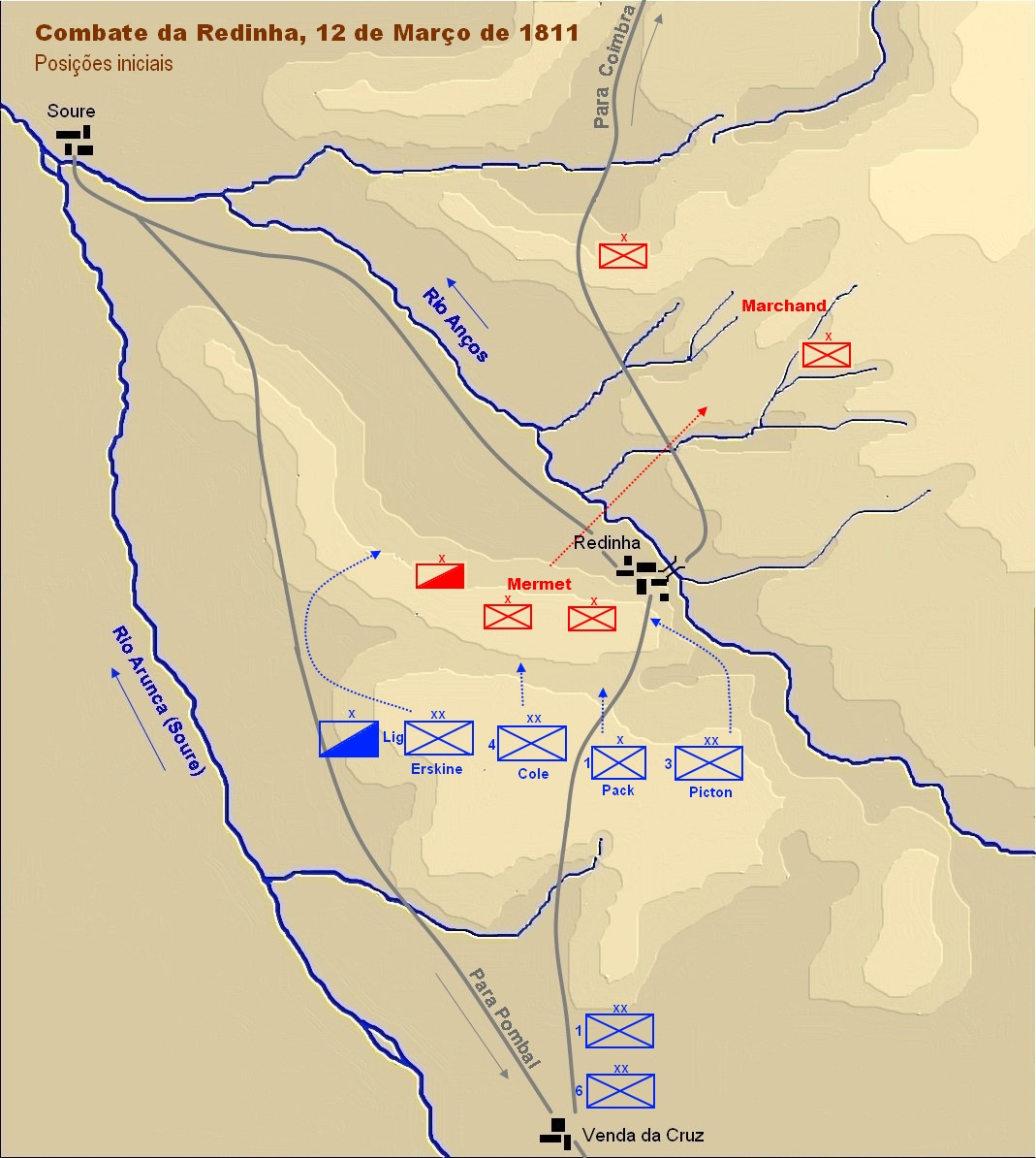 Mapa com indicações dos principais posições e movimentos durante o combate de Redinha em 12 de Março de 1811